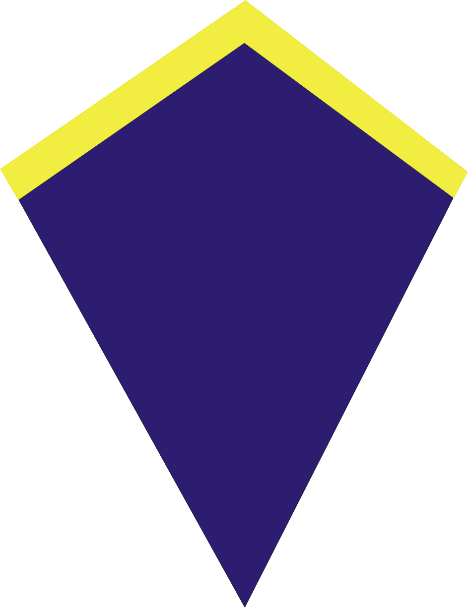 Patka piechoty na kołnierz kurtki szeregowca stosowana w Wojsku Polskim we Francji po 1940